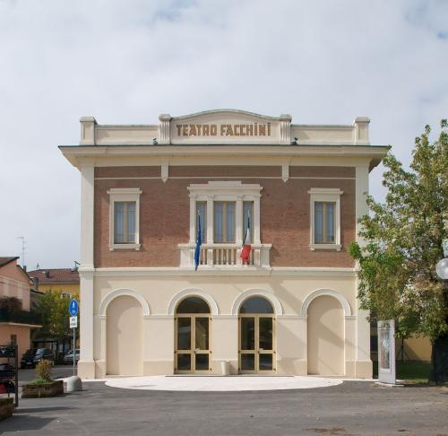 Teatro comunale Webben Facchini a Medolla